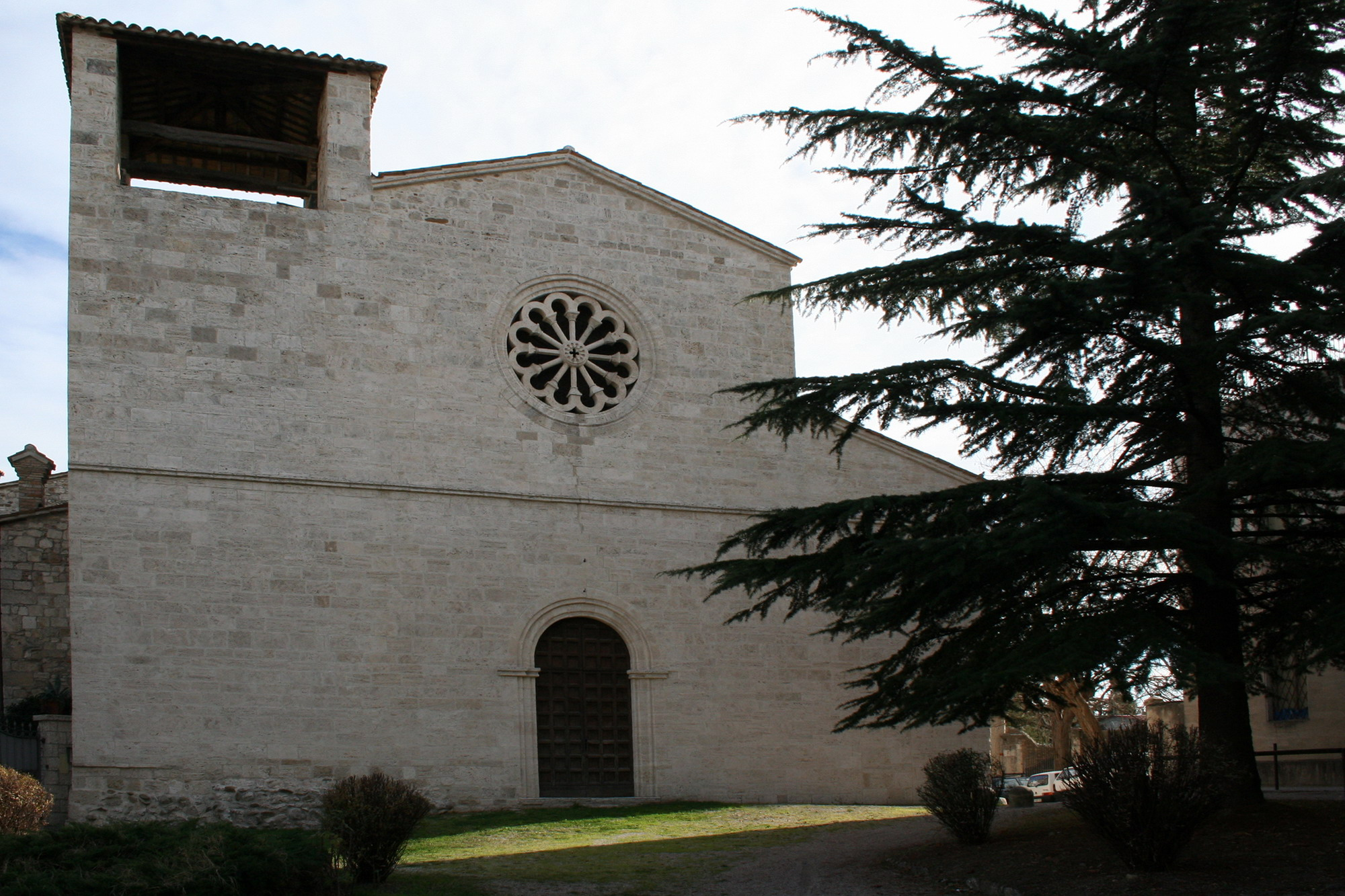 Chiesa di San Vittore di Ascoli Piceno, esterno giorno, proprio scatto Sibilla.io "Utilizzo concesso" Ticket#2007040410014627 (ticket per le immagini) This file is licensed under Creative Commons 3.0 license